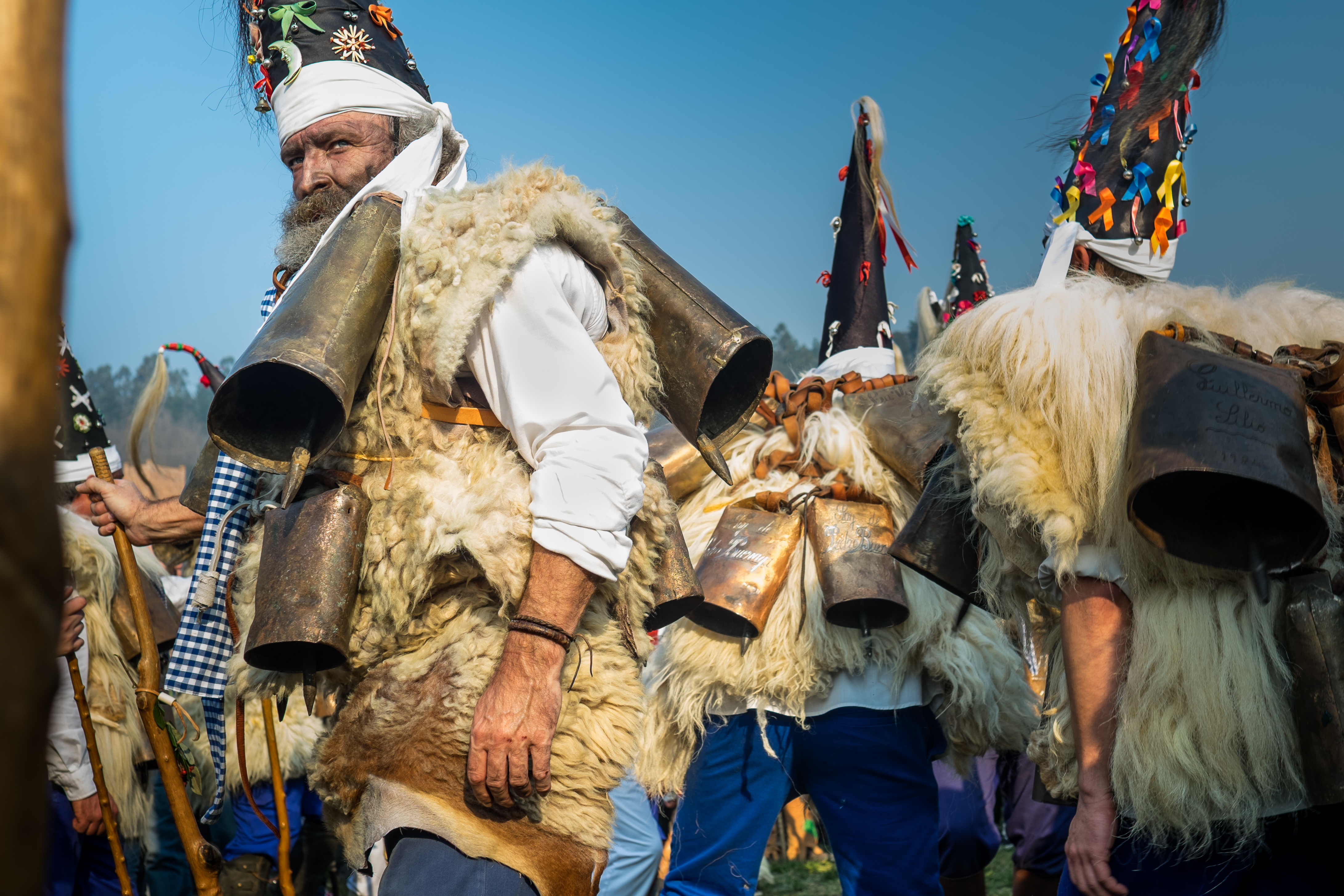 La Vijanera, primer carnaval del año en Silio, Cantabria, España. This is a photography of a Folklore festival in Spain (Wikidata id Q648409).